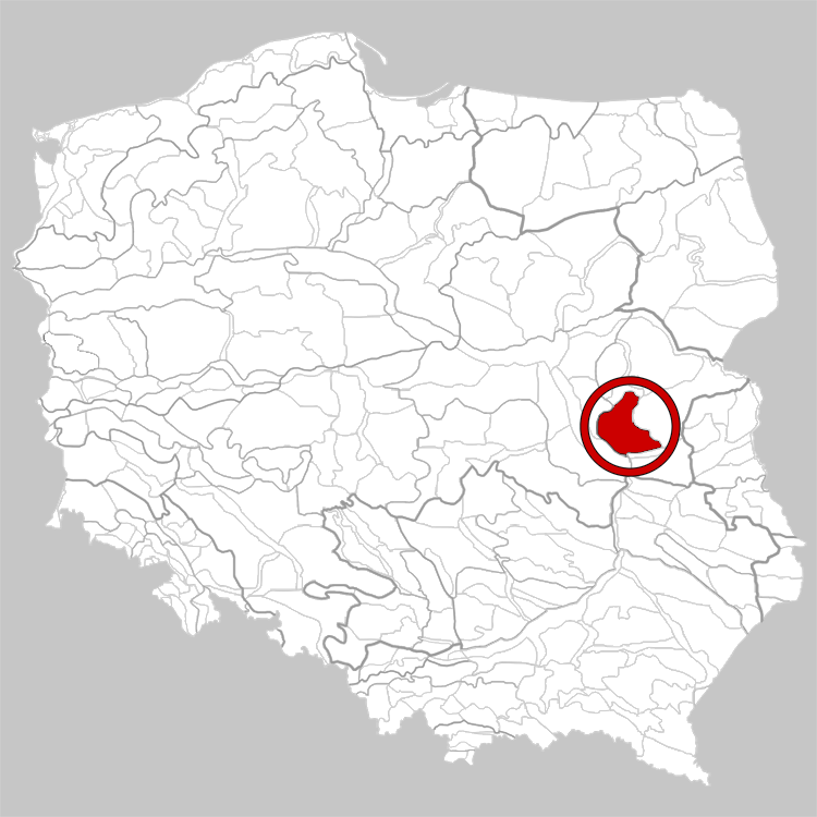 Physico-geographical regionalization of Poland Mezoregion 318.95 Żelechów High Plain Regionalizacja fizycznogeograficzna Polski Mezoregion 318.95 Wysoczyzna Żelechowska